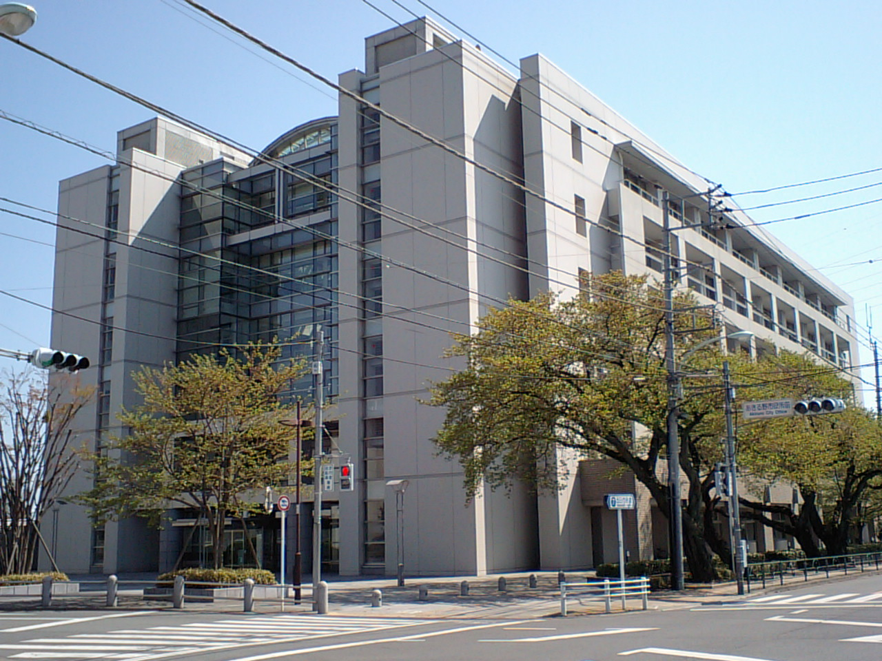 Akiruno City Hall, Tokyo, Japan